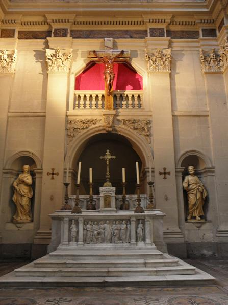 Choeur de l'église St-Polycarpe de Lyon